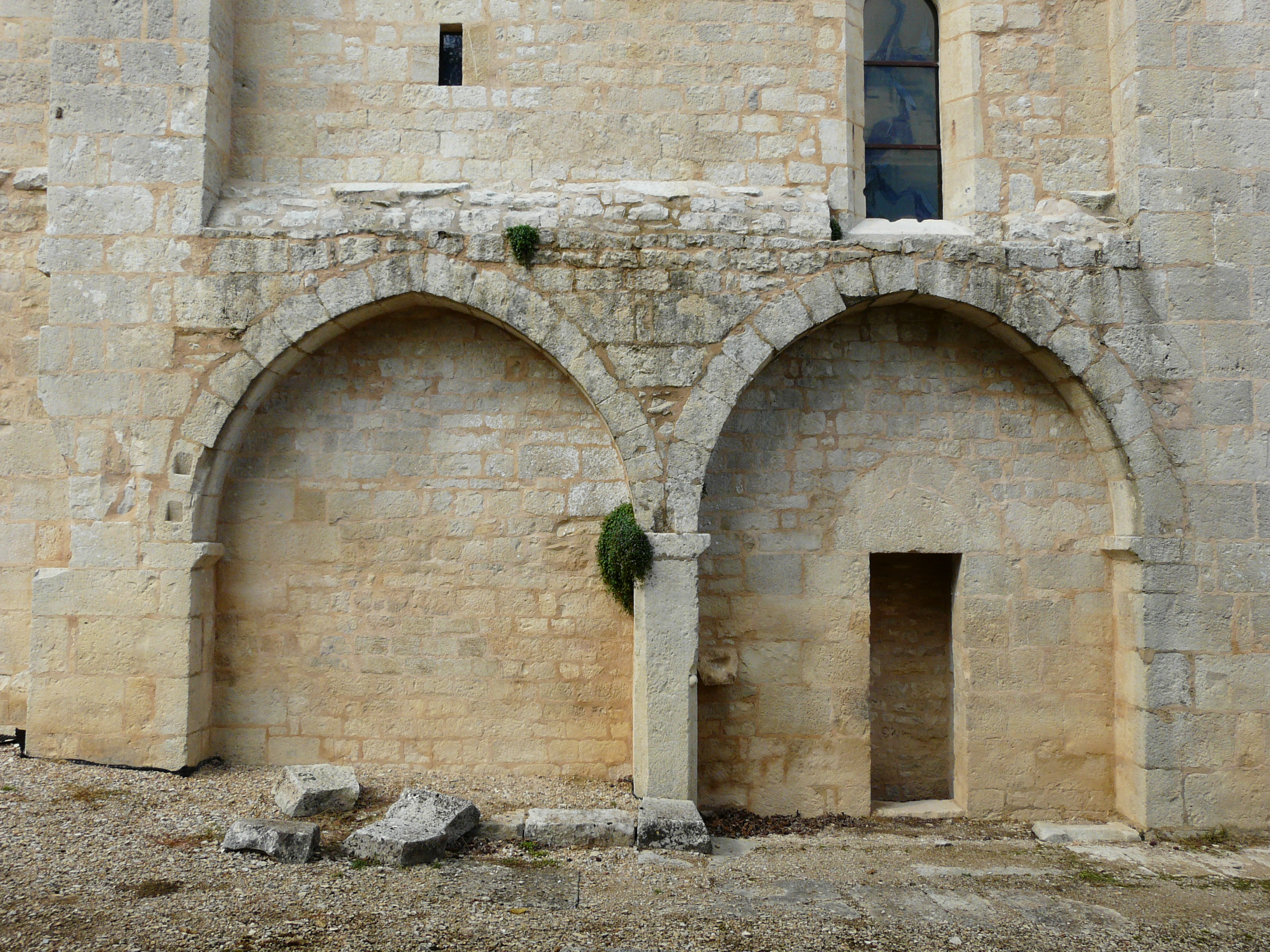 La façade sud de l'église d'Ajat, Dordogne, France.